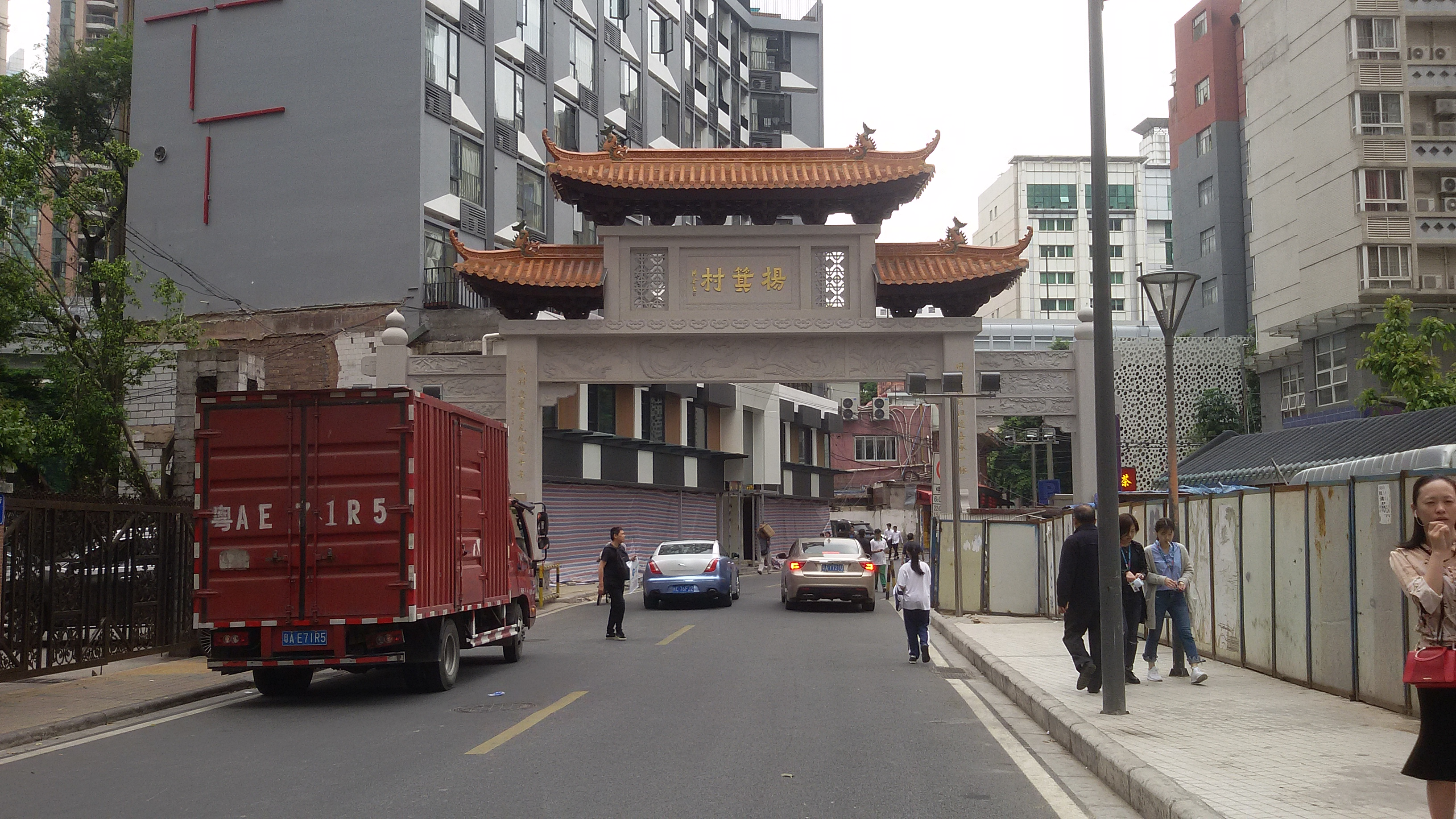 粵語: 楊箕嘅北牌樓門